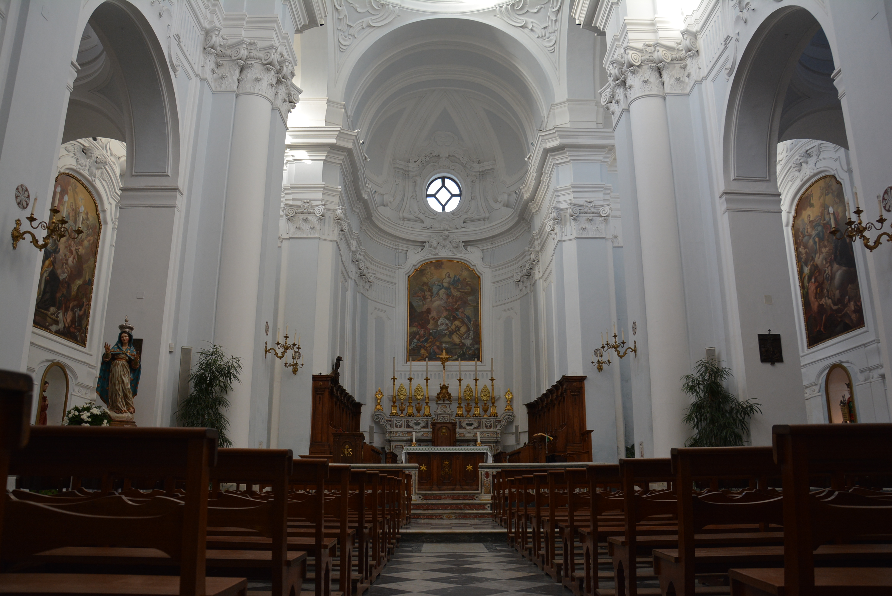 Cattedrale di Santa Maria Assunta a Ischia